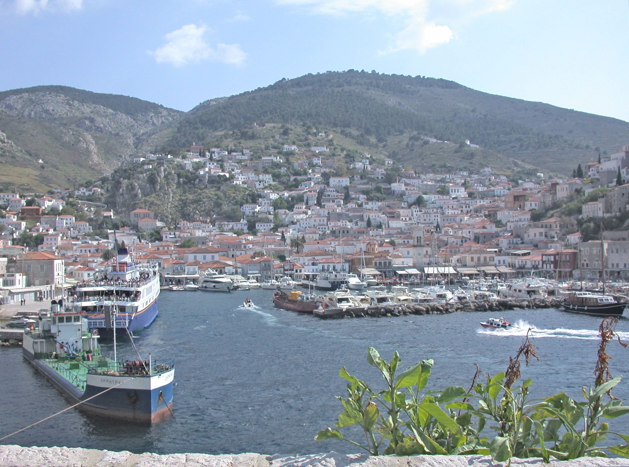 Grecia, isola di Idra, città di Idra, panorama del porto dal bastione nord-orientale